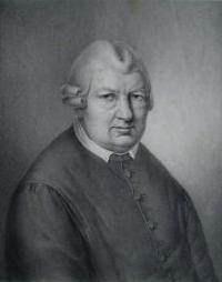 Hermann Rentzel (1764-1827), Diakon an der Hamburger St.-Jacobi-Kirche. Lithographie von Gerdt Hardorff d.J. (1828)